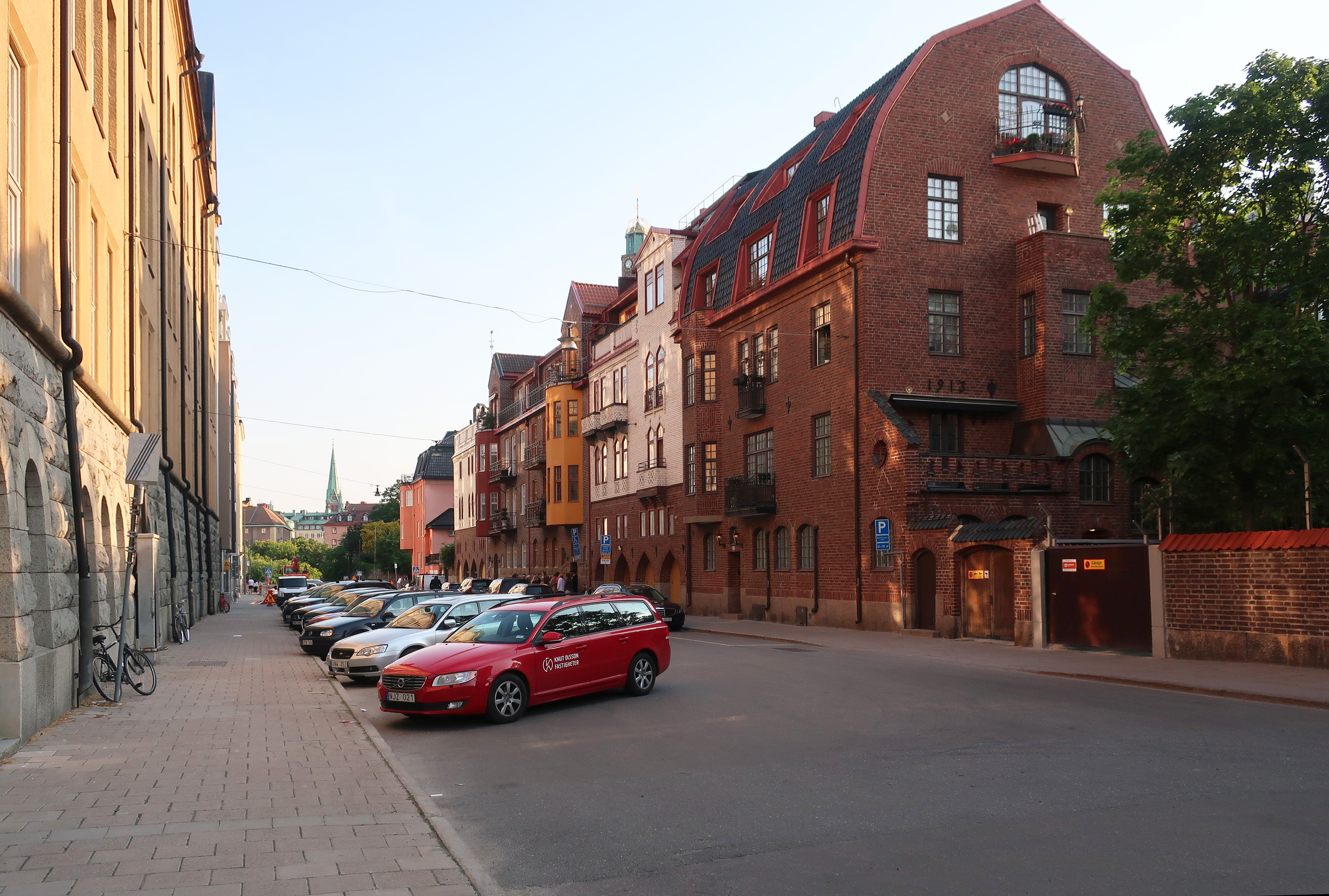 Uggelviksgatan sedd från en återvändsgränd intill Valhallavägen, juni 2019.